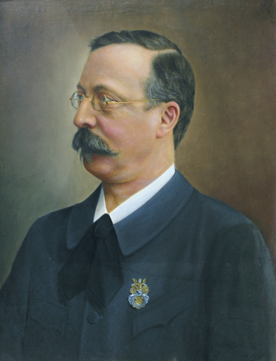 Eduard Strache (1847 - 1912), Rakouský a český nakladatel, novinář a politik německé národnosti.